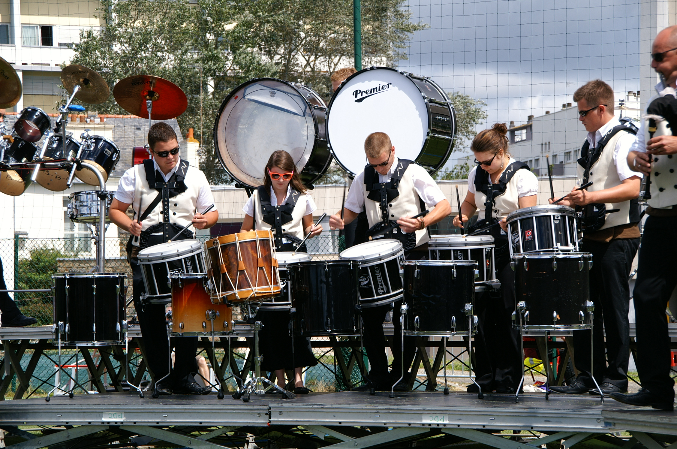 Le Bagad Bro Felger lors du concours des bagadoù de 2de catégorie, au festival interceltique de Lorient 2013